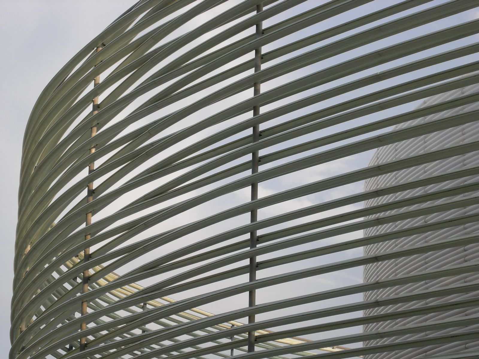 Palacio de Congresos de Badajoz, Extremadura, Spain